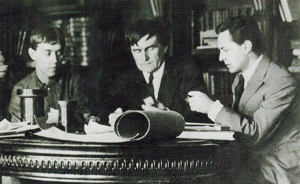 Николай Суетин, Казимир Малевич, Илья Чашник. Петроград, 1923